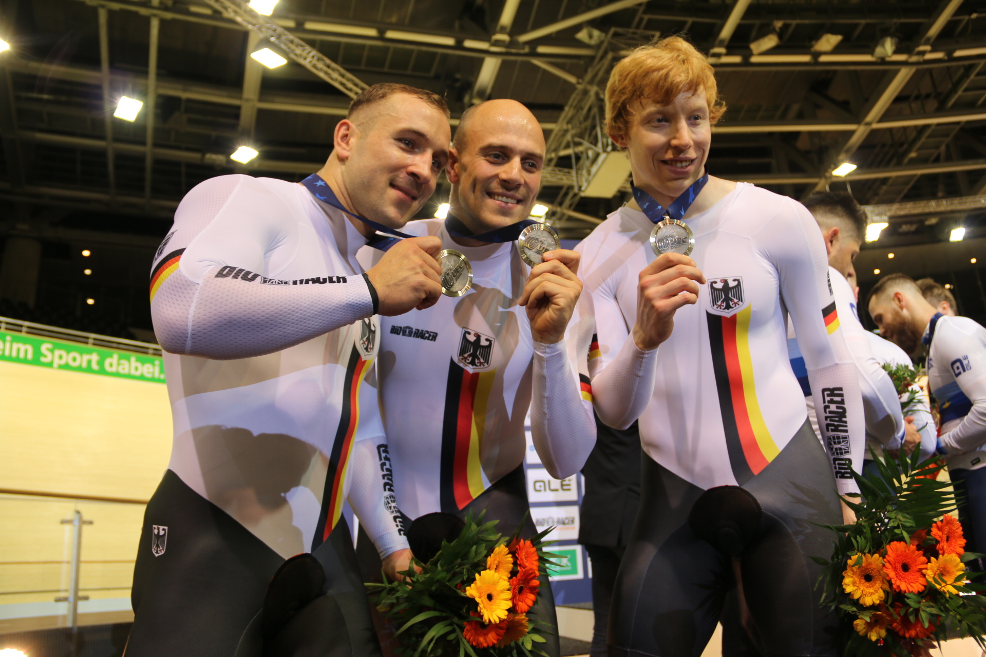 deutsche Mannschaft, Silber im Teamsprint, v.l.n.r.: Robert Förstemann, Maximilian Levy, Joachim Eilers